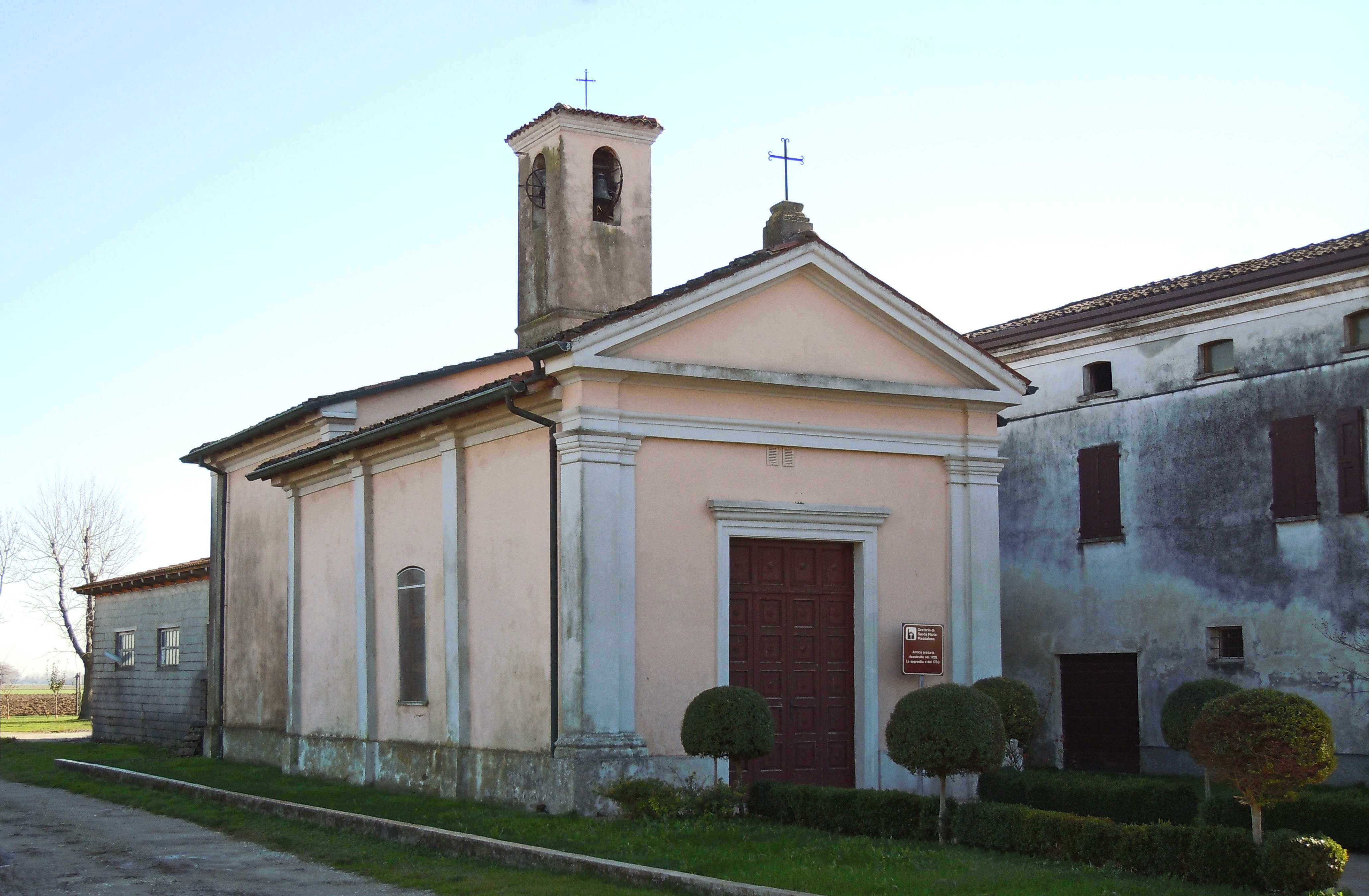 Castel Goffredo, frazione Poiano, oratorio di Santa Maddalena.